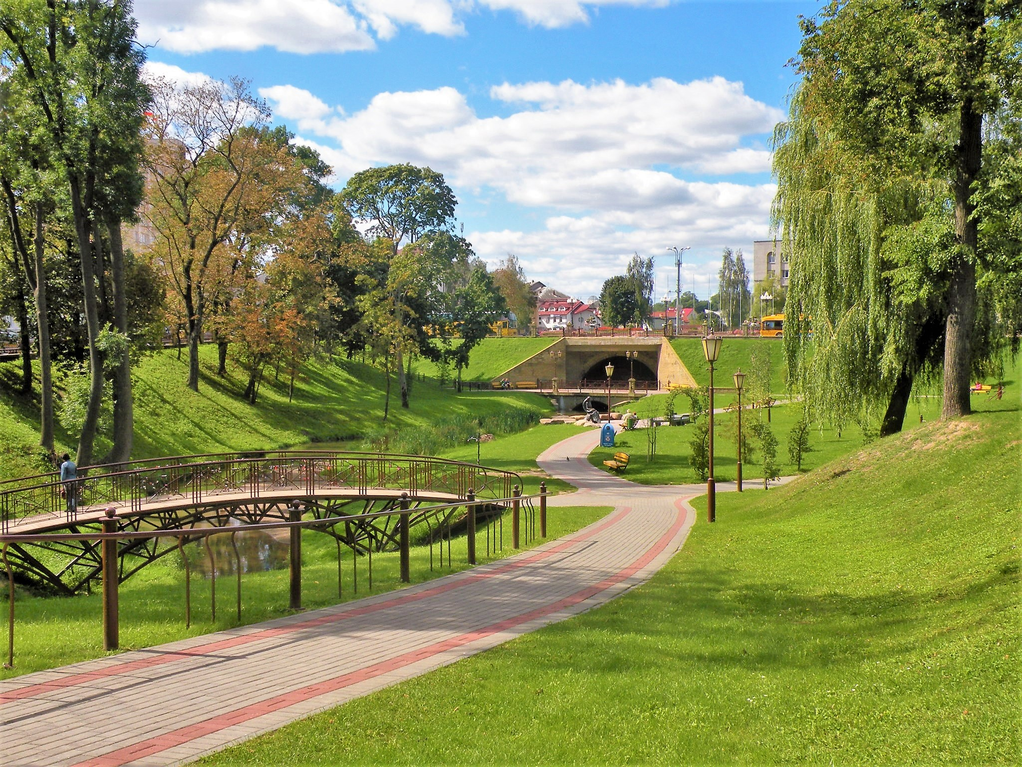 Аллея вдоль Городничанки. Городской парк культуры и отдыха им. Ж.-Э. Жилибера, Гродно, Беларусь.